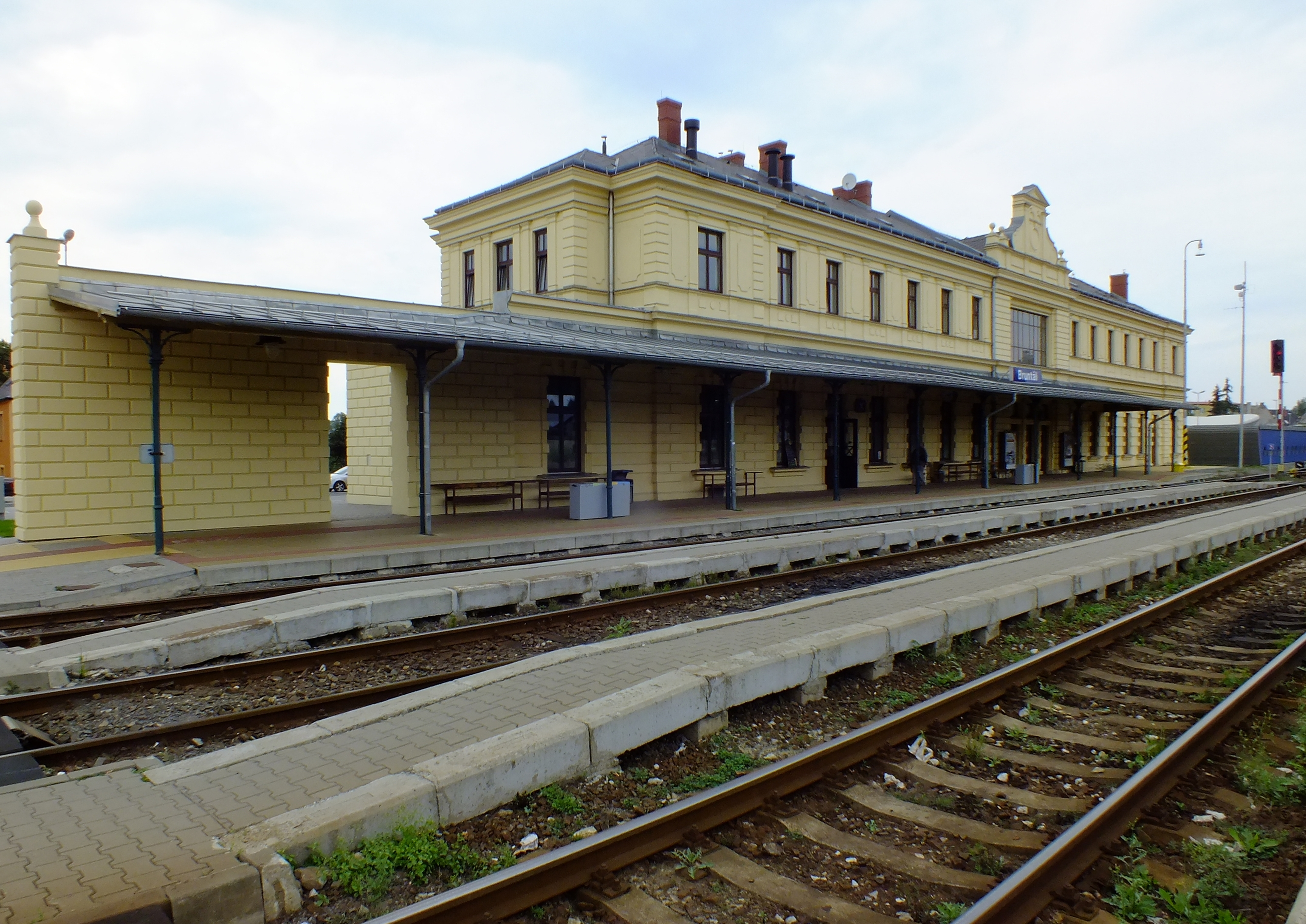 Staniční budova z kolejiště